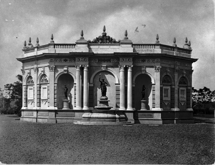 Foto. Het gebouw van de Artesische put op het Koningsplein te Batavia.